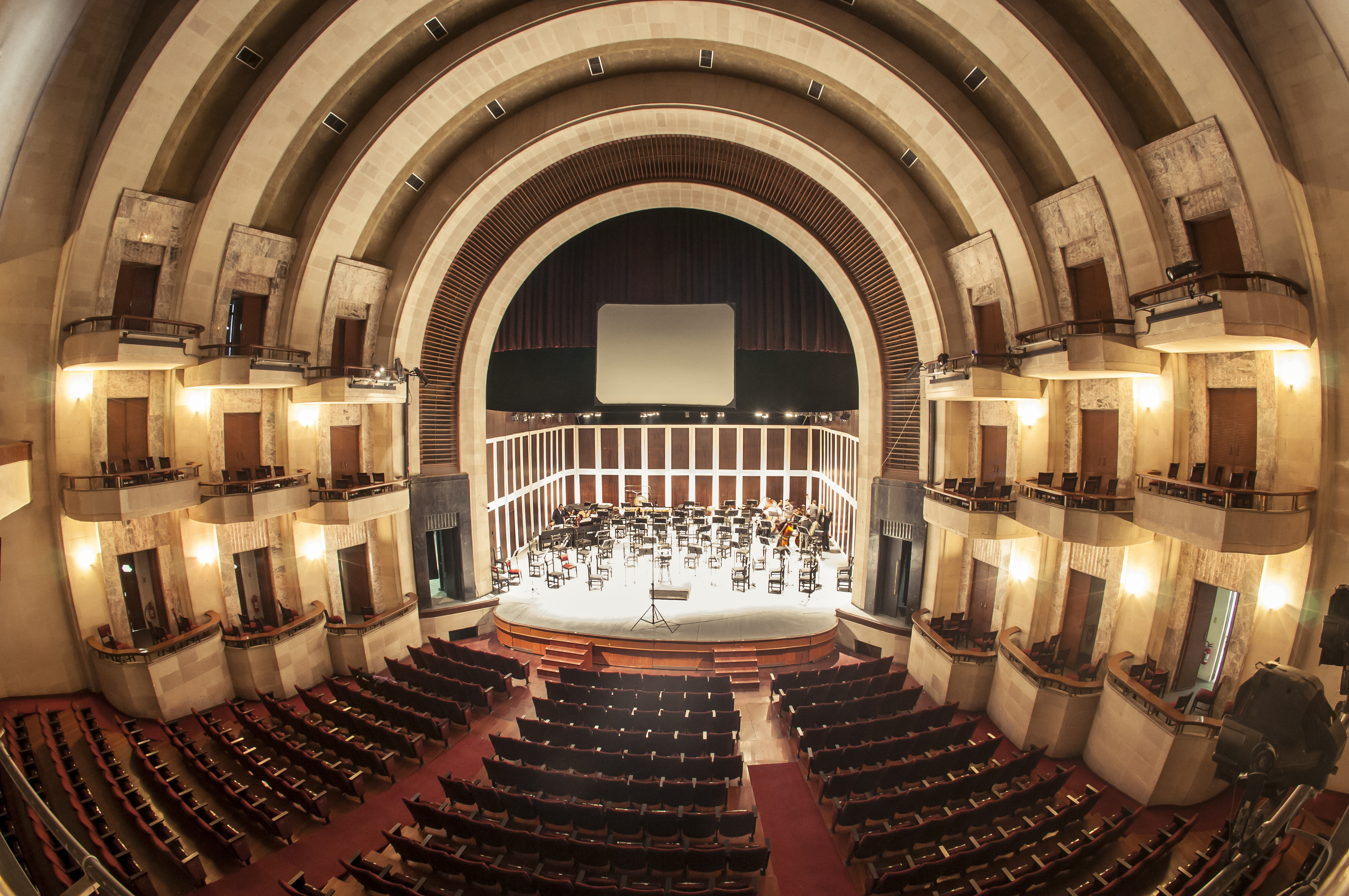 Vista del interior del Teatro de la Paz en el centro de la ciudad de San Luis Potosí, en México.